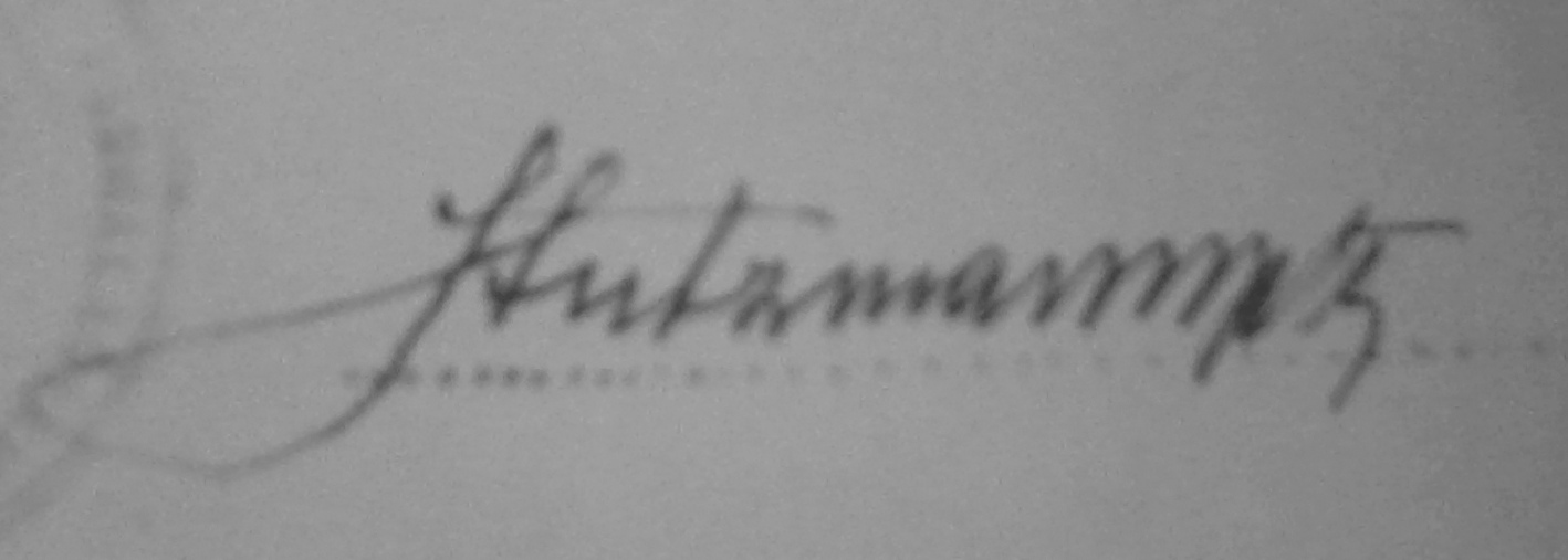 Podpis płk. Franciszka Stutzmanna (1926)